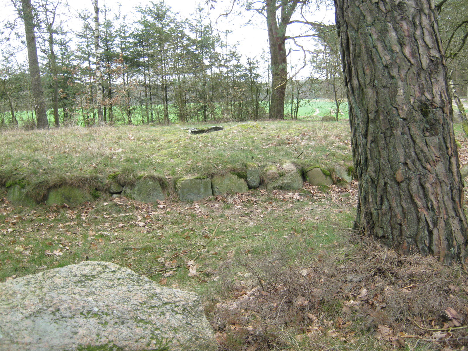 Dolmengrab mit Steinkiste in der Mitte in der Nähe von Rolfsen bei Lüneburg.